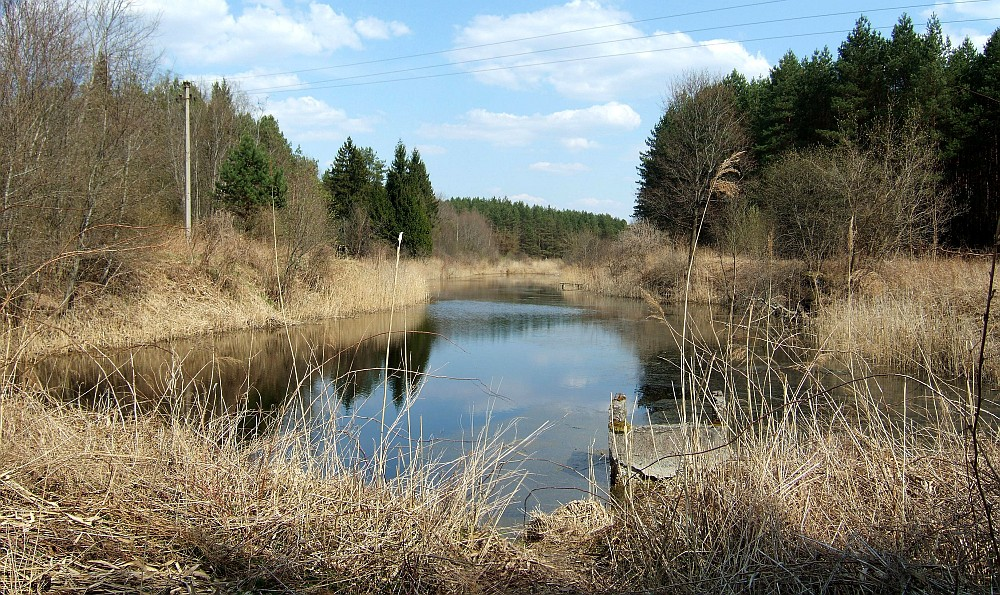 Turniškės upelis